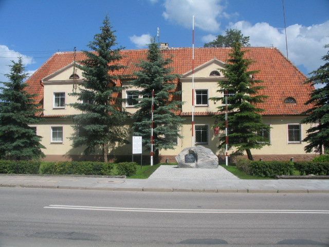 Budynek Urzędu Gminy w Starym Targu